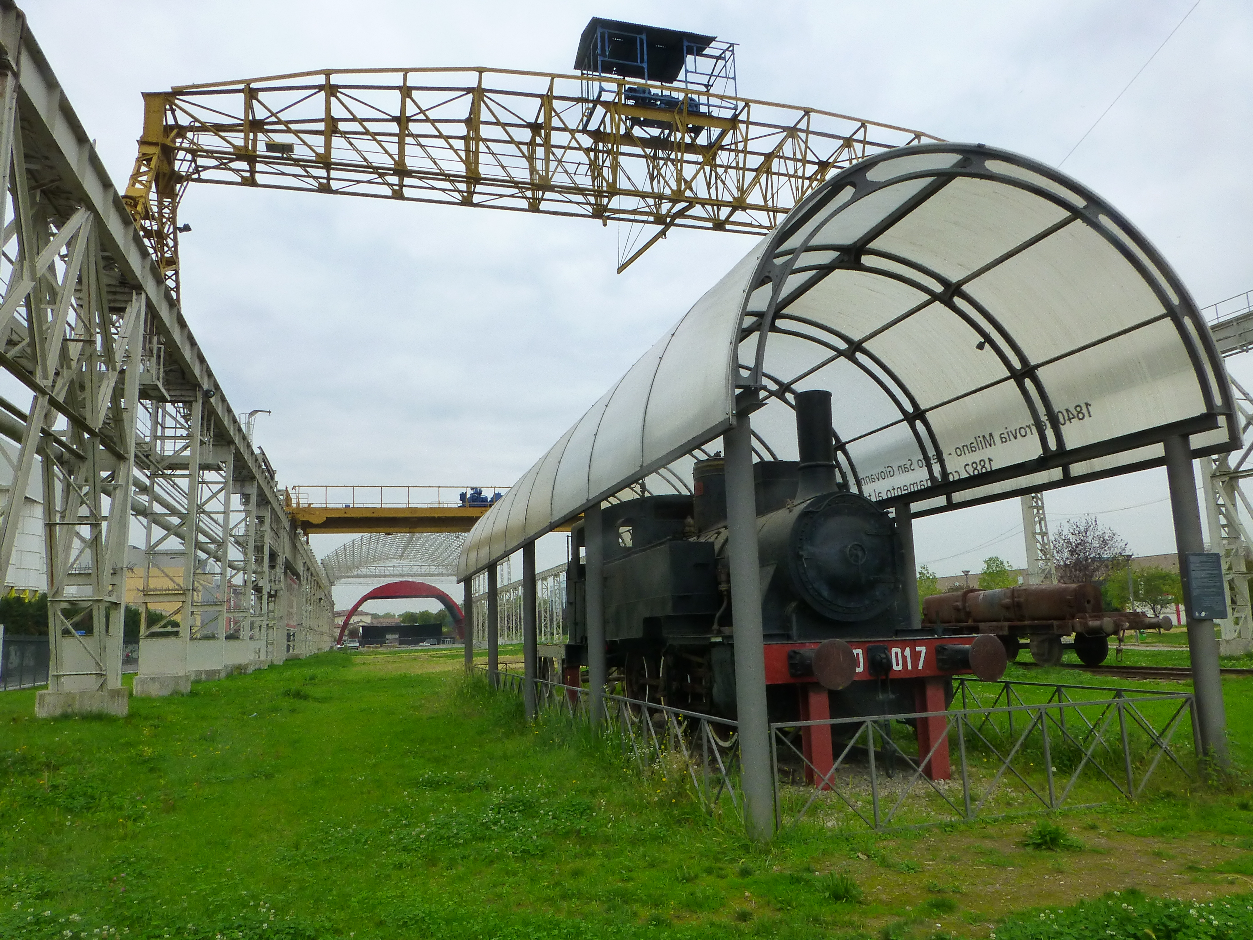 La vecchia locomotiva 830.017 all'interno di ex stabilimento BREDA Sesto San Giovanni - Italia